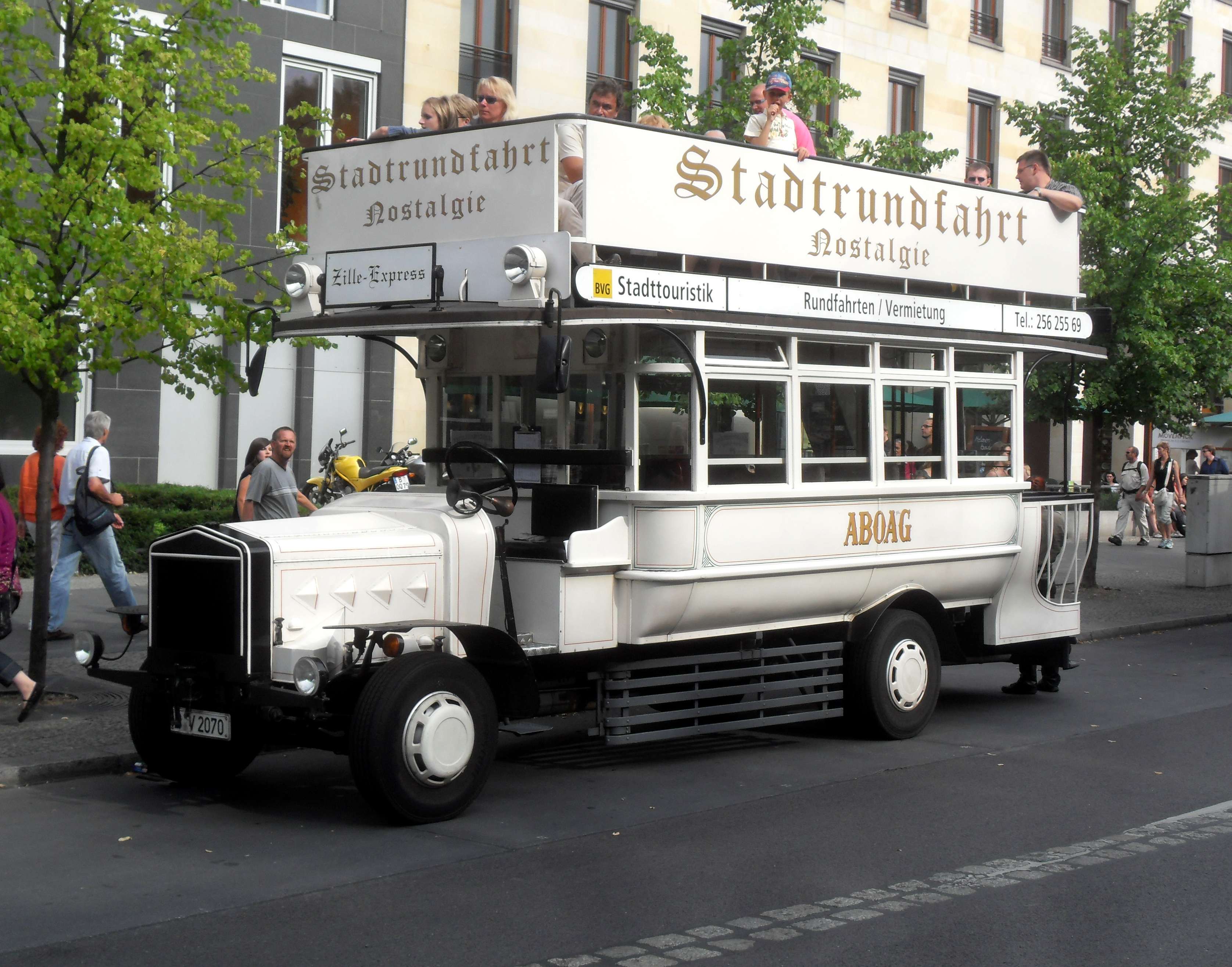 Ein renovierter Bus der Allgemeinen Berliner Omnibus AG (ABOAG) als Zille-Express in Berlin